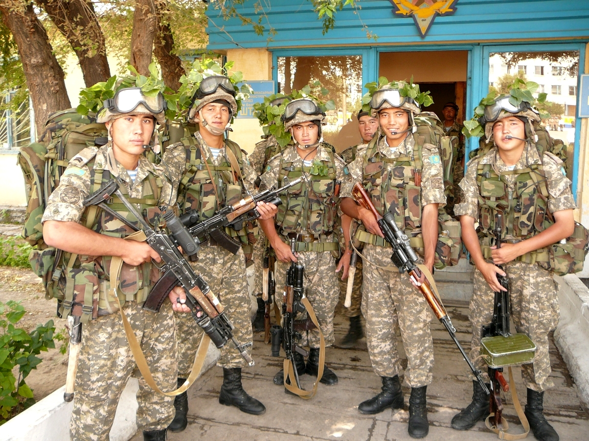 Бойцы 35-ой Десантно-Штурмовой Бригады в полевой экипировке